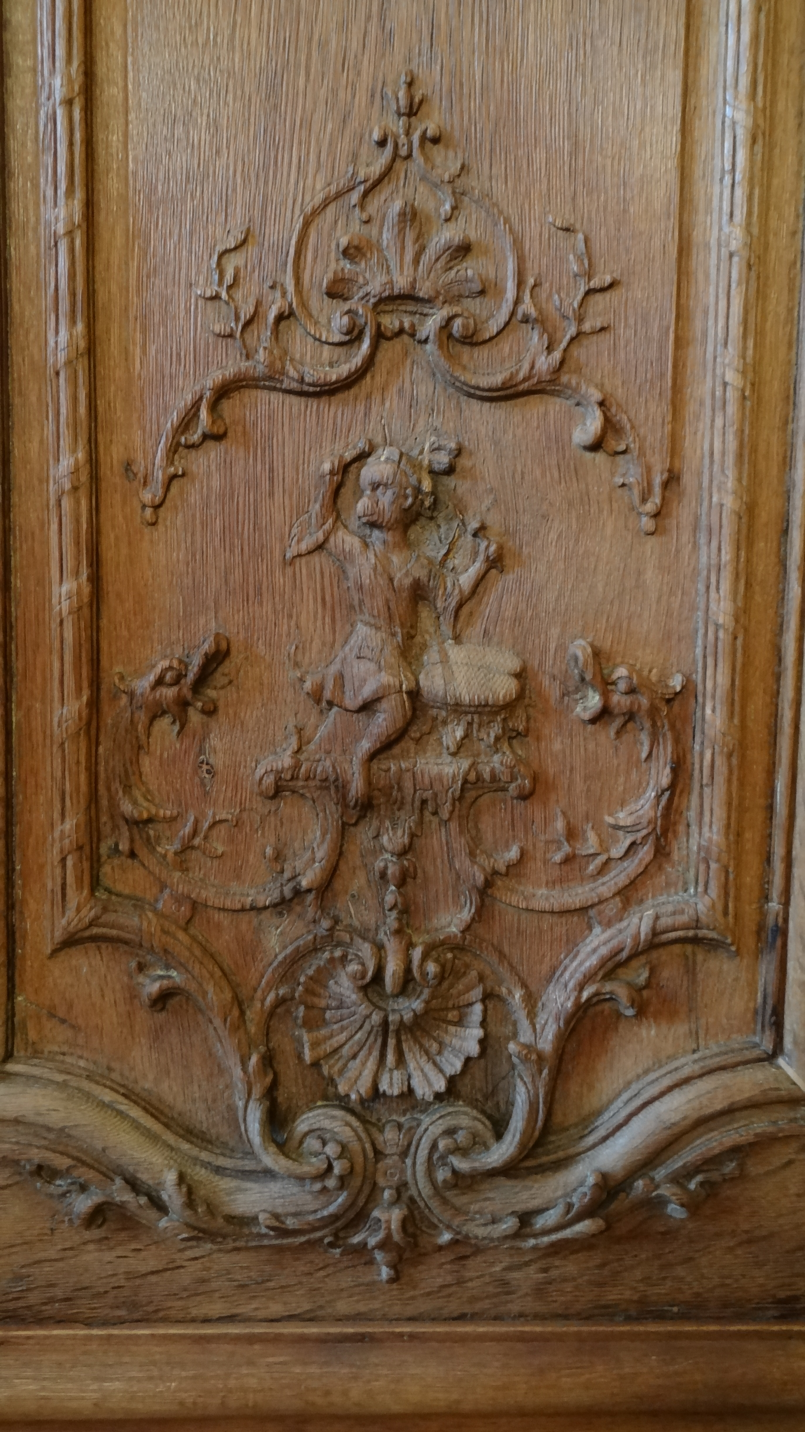 fable de La Fontaine, le Singe, Boiseries de la salle à manger de l'Hôtel de Noirmoutier, Paris .